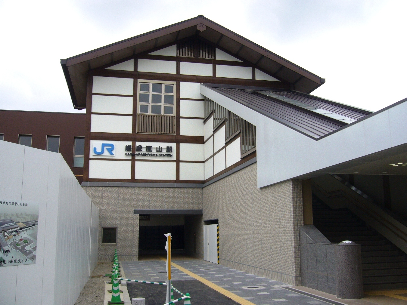 JR西日本山陰本線（嵯峨野線）嵯峨嵐山駅の橋上駅開業直後の北口の姿。従来駅舎があったのは南側であり、北口は新設されたが、取り付け道路や駅前広場はまだ完成しておらず、仮囲いで囲まれている。南側の駅舎は完全には完成していないが、北口側はほぼ完成している。新駅舎開業翌日の2008年6月15日に投稿者が撮影。